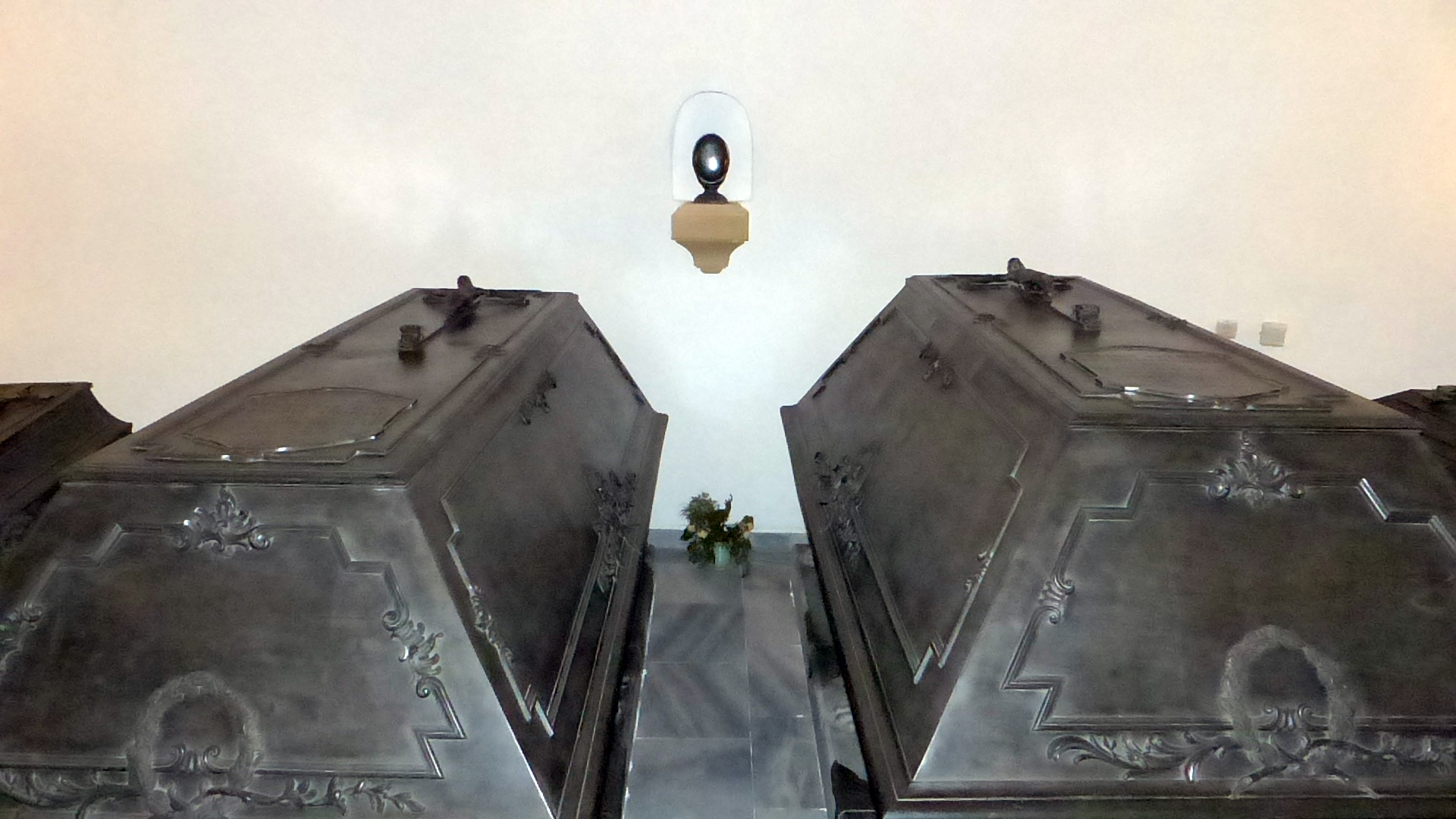 Sarkophage für Friedrich August II. und Maria Josepha von Österreich, an der Wand die Herzkapsel für den Kurfürsten Friedrich August I., in der Stiftergruft der Wettiner Gruft in der Katholischen Hofkirche, Dresden